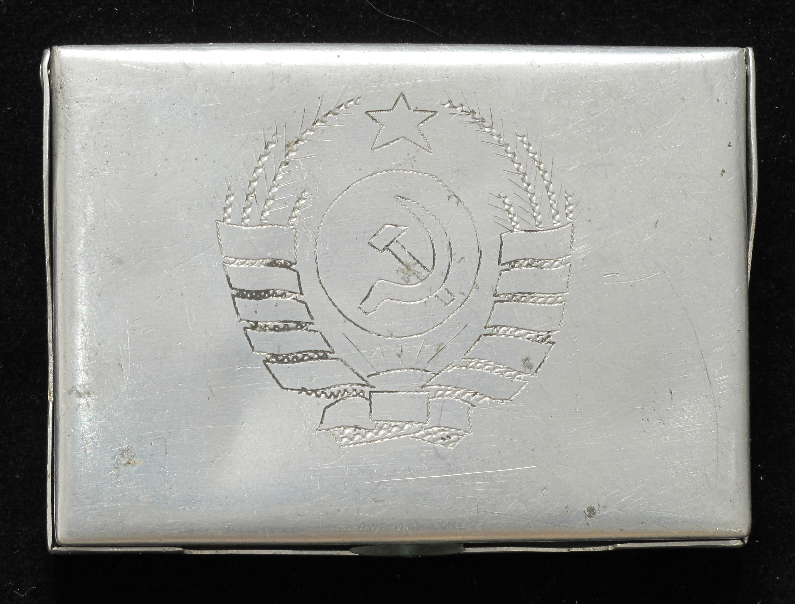 russisk krigsfangearbeid Aust-Agder museum og arkiv Kuben